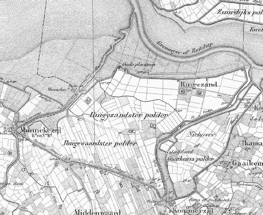 Ruigezandsterpolder